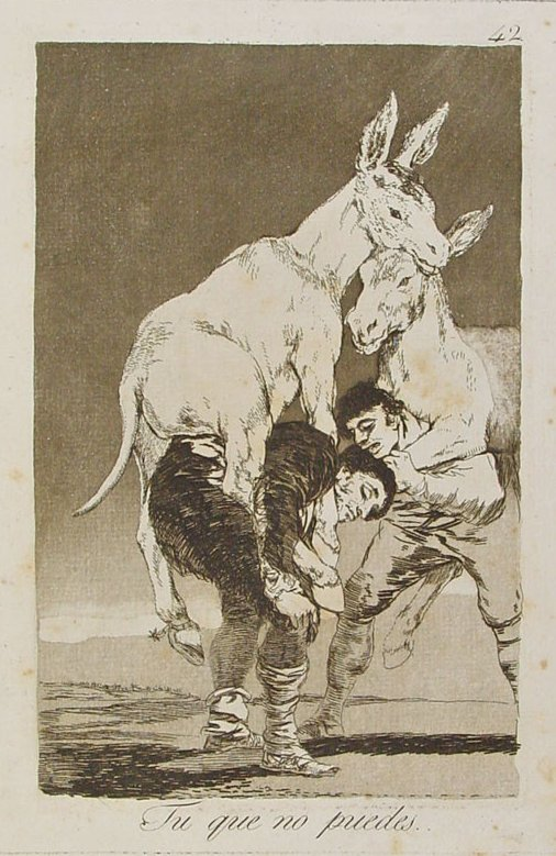 Capricho nº 42: Tú que no puedes de Goya, serie Los Caprichos